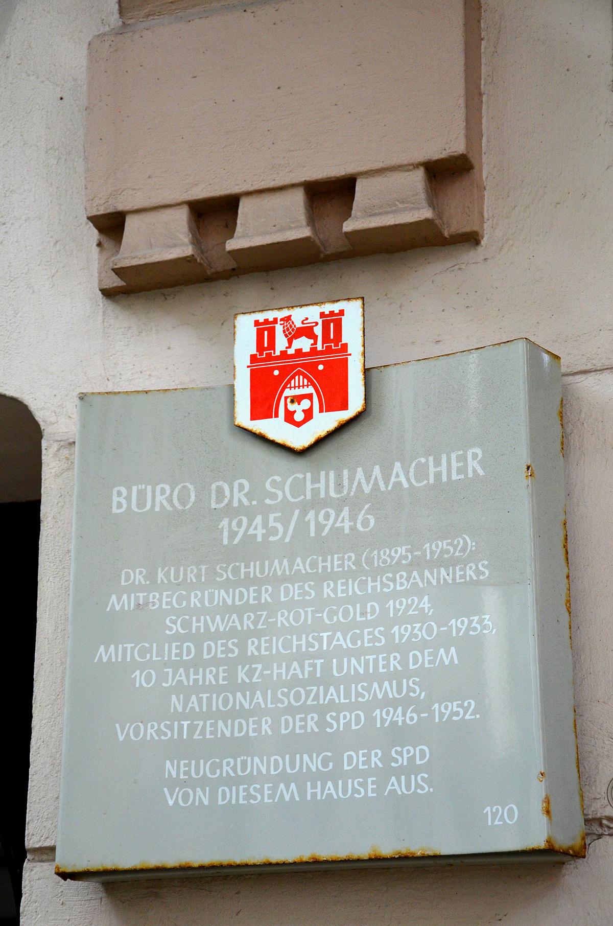 Das Büro Dr. Schumacher im denkmalgeschützten Haus Jacobsstraße 10 in Hannover im heutigen Stadtteil Linden-Mitte war nach dem Zweiten Weltkrieg noch zur Zeit der Britischen Besatzungszone vom 19. April 1945 bis zum 6. Oktober 1945 das Büro des späteren SPD-Vorsitzenden Kurt Schumacher ...